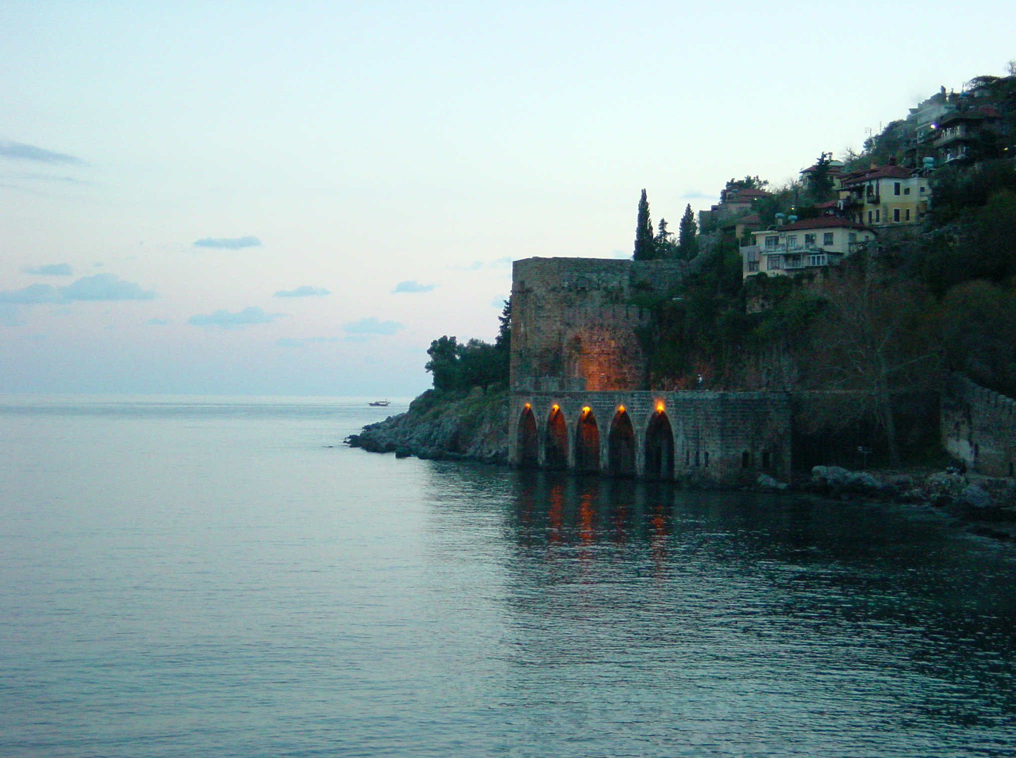 2003-12-28 01-04 T�rkei 063 Alanya, Seldschukische Schiffswerft